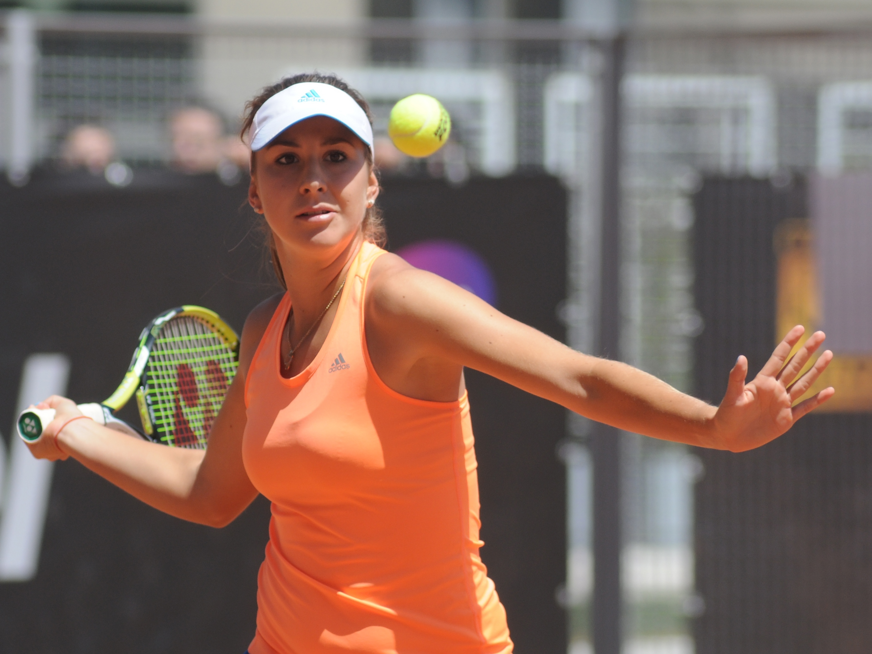 Belinda Bencic at the 2014 Internazionali BNL d'Italia